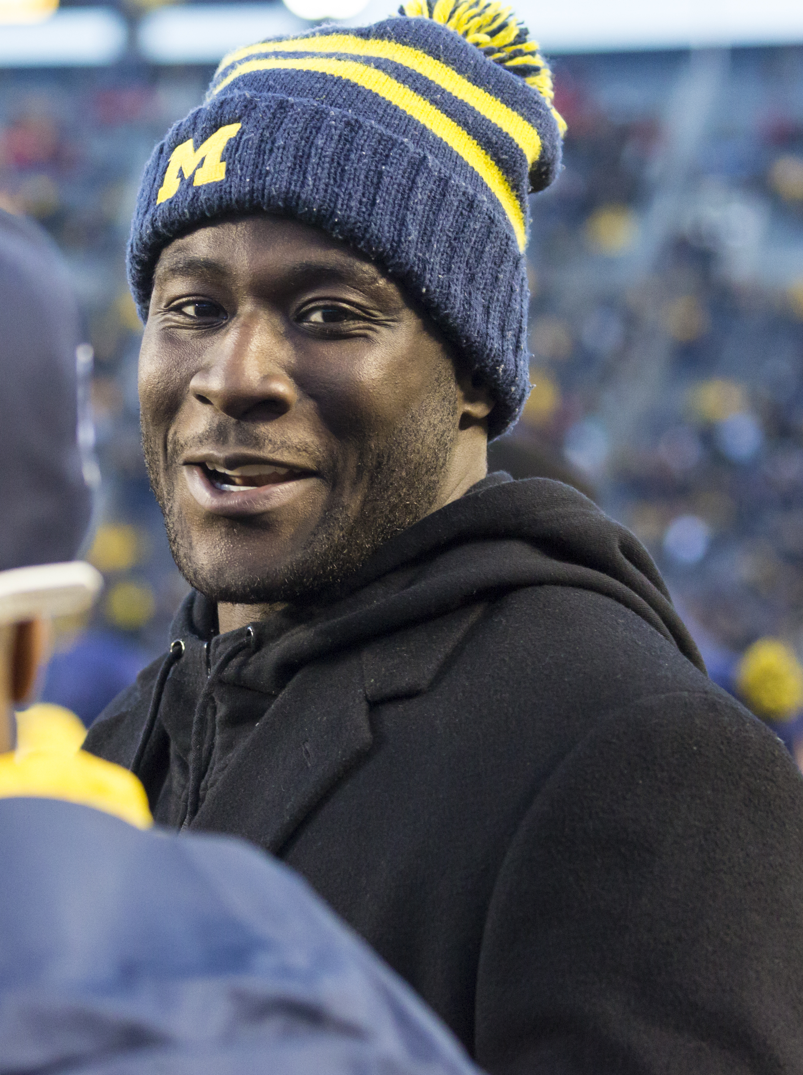 IX8A7848